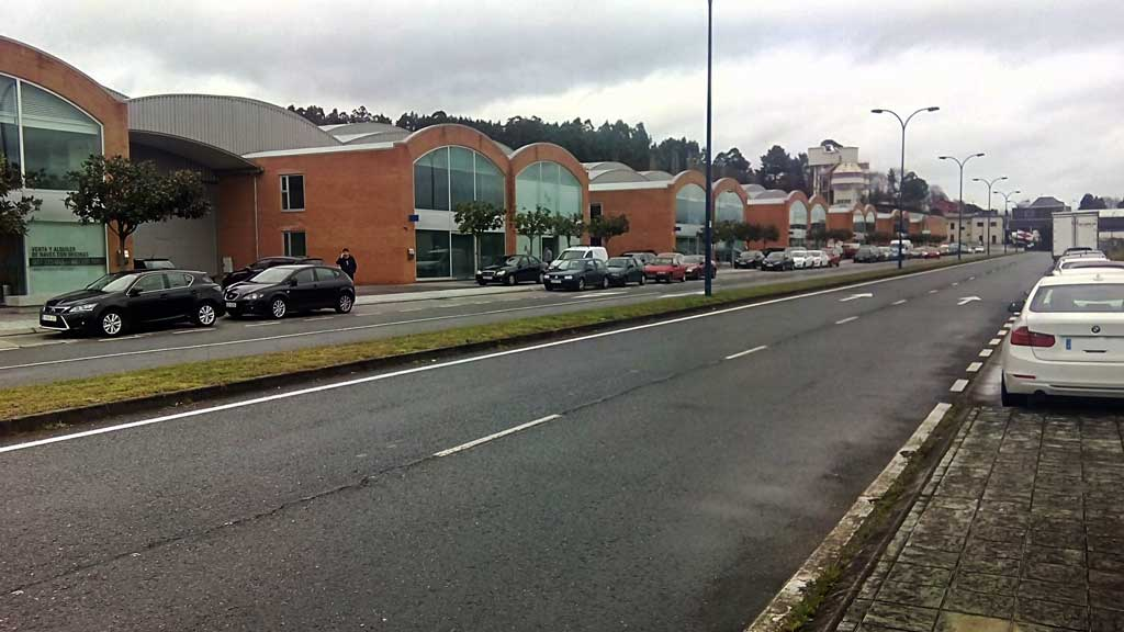 Vista do polígono de Alvedro.